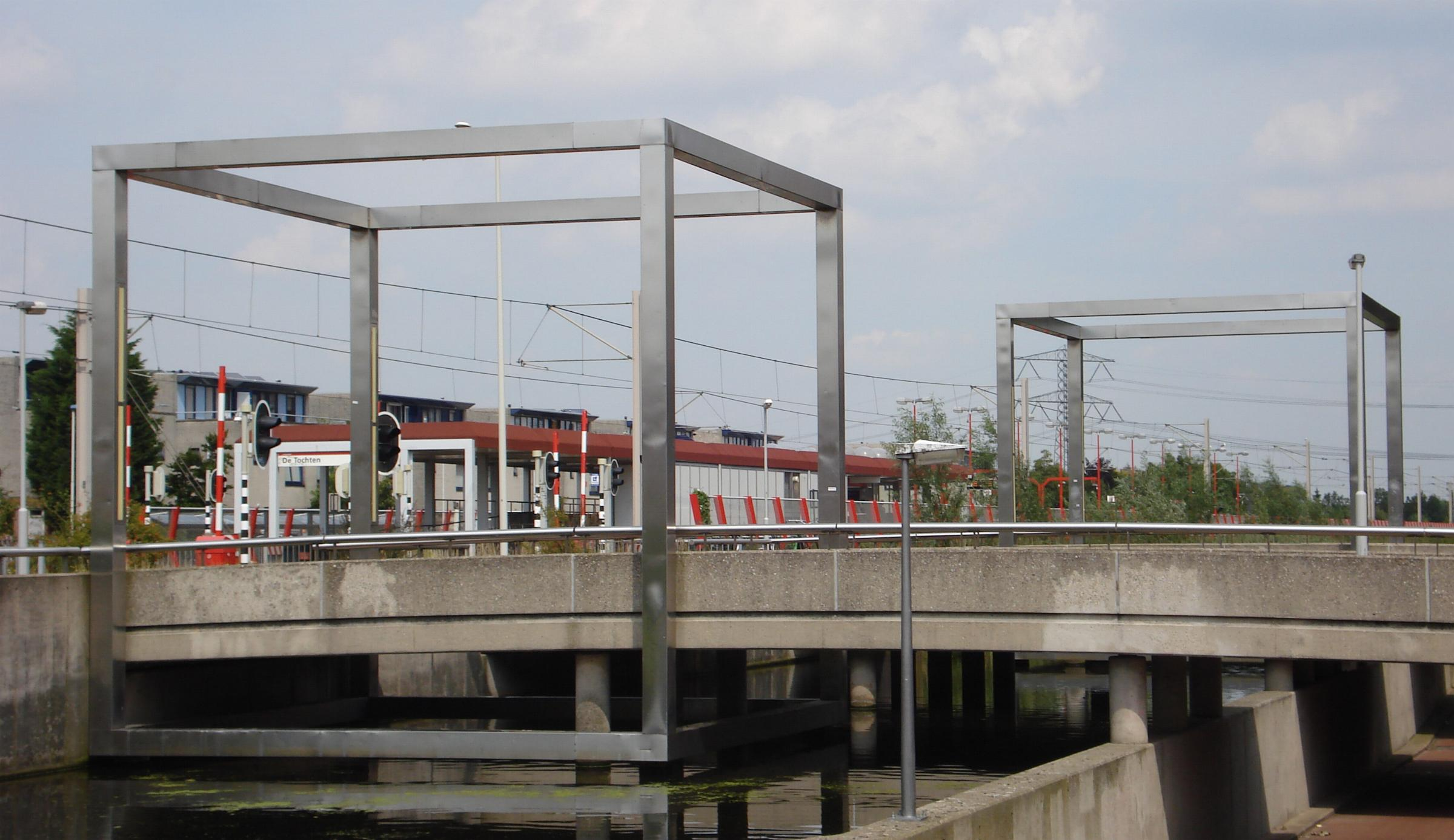 Rotterdam Zevenkamp, Zevenkampsering/Tochtenweg. Kunstwerk "Stalen kubussen" van Coen Wilderom & Wim van de Horst. Rotterdam/The Netherlands.